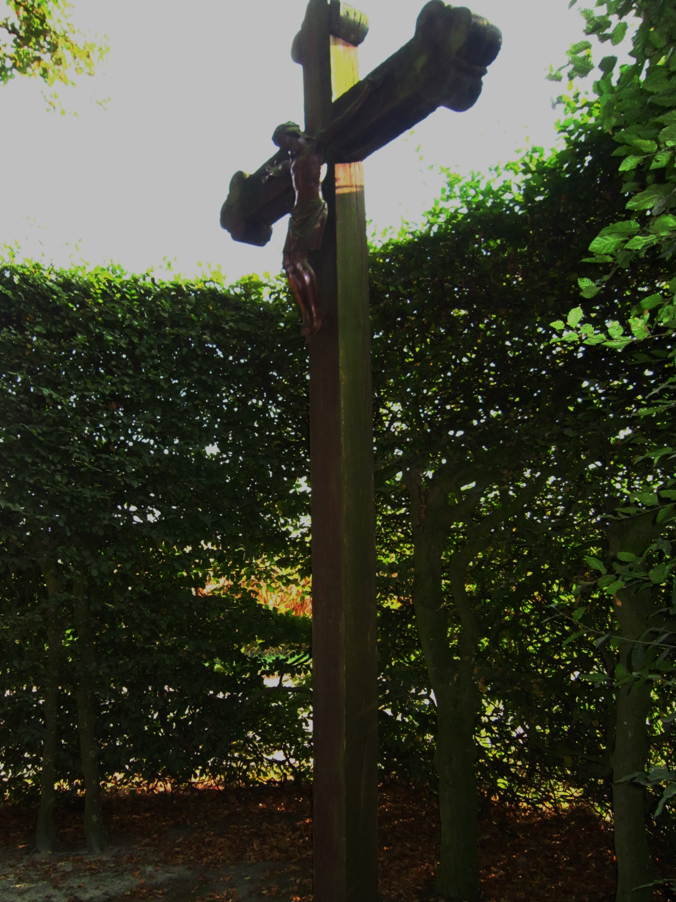 Thesings Kreuz am Pickerweg im Norden Vechtas